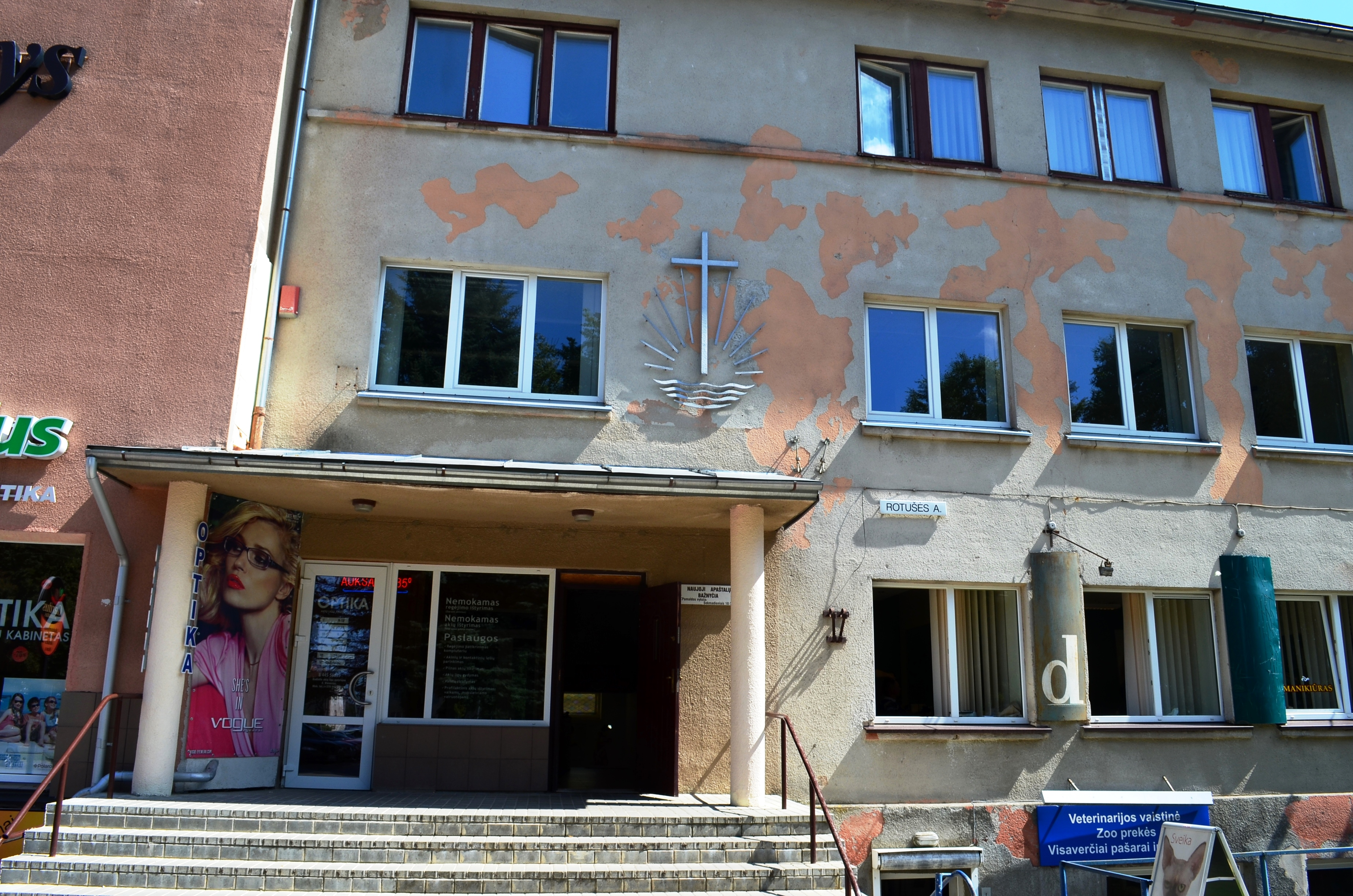 Kretingos Naujųjų Apaštalų bažnyčia